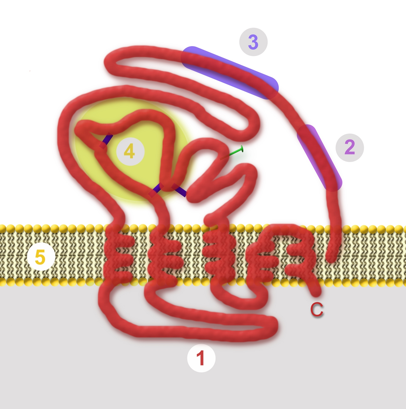 Membrantopologie des großen Oberflächenproteins des Hepatitis-B-Virus (L-HBsAg). 1: intrazelluläre Domäne, 2: T-Zell-Epitop, 3: Bindungsstelle an die Leberzelle, 4: Hypervariable Region (im S-HBsAg), 5: Lipidmembran